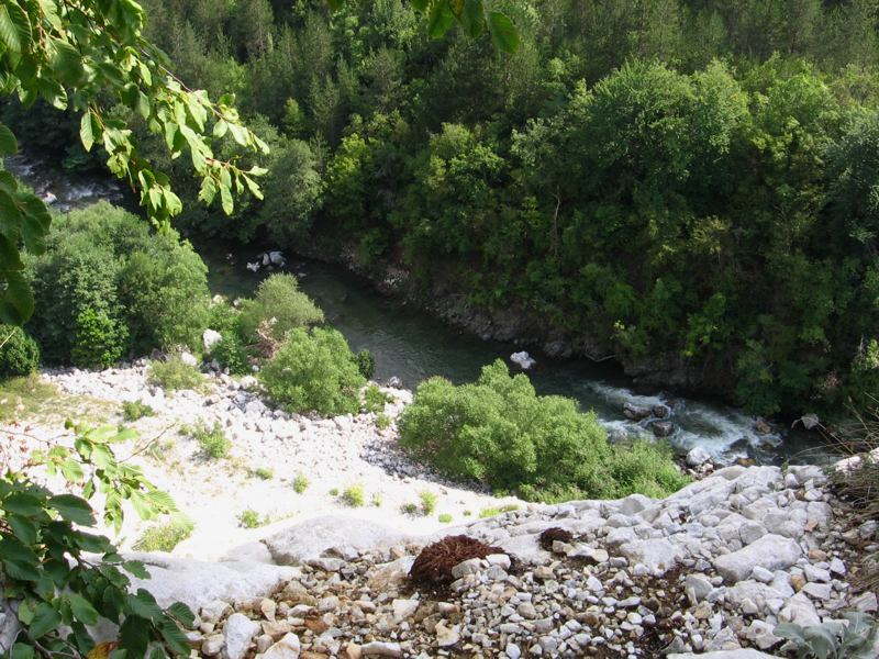 Der Fluß Jugowska